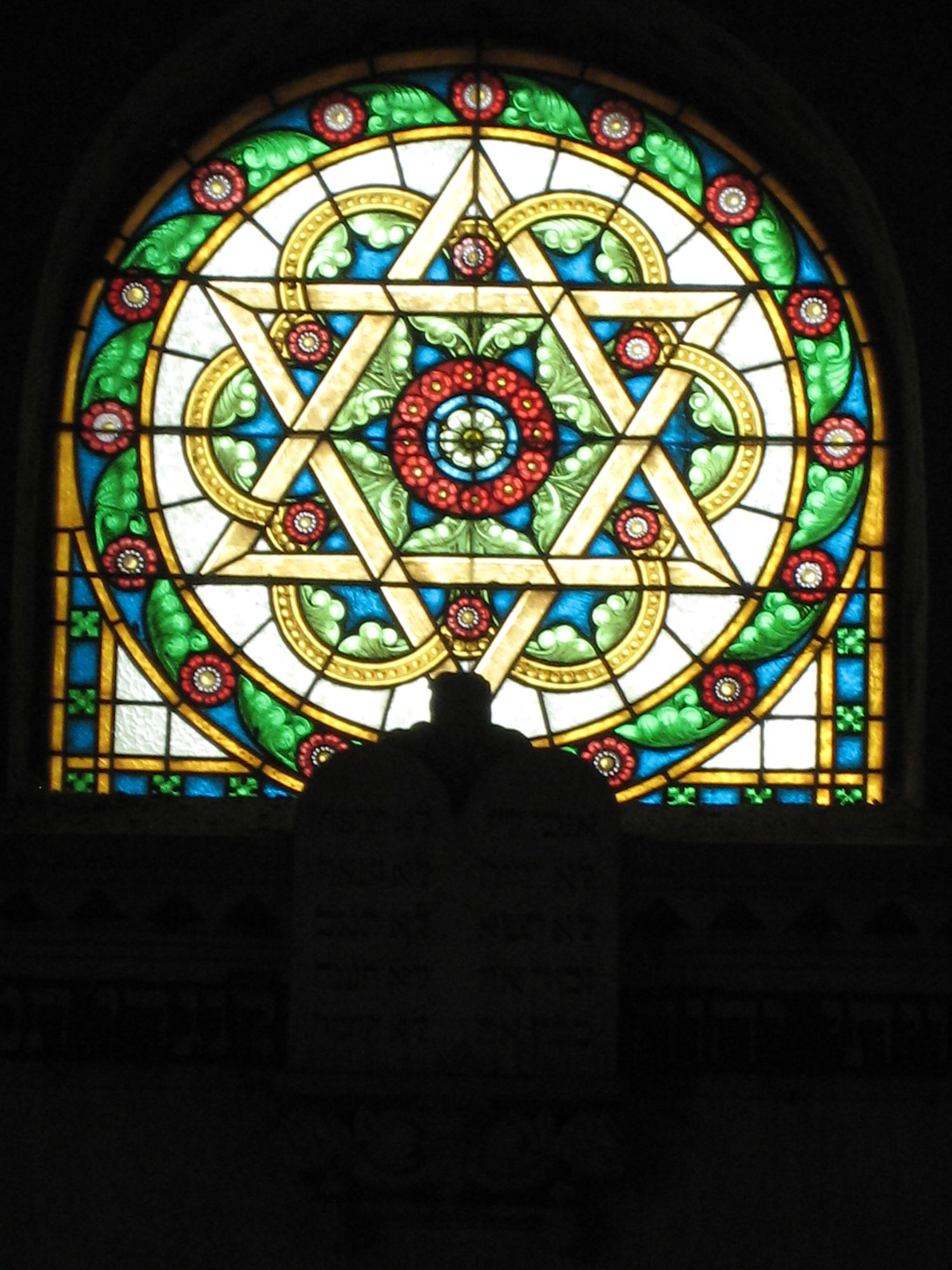 Synagogue de Schirmeck : Vitrail